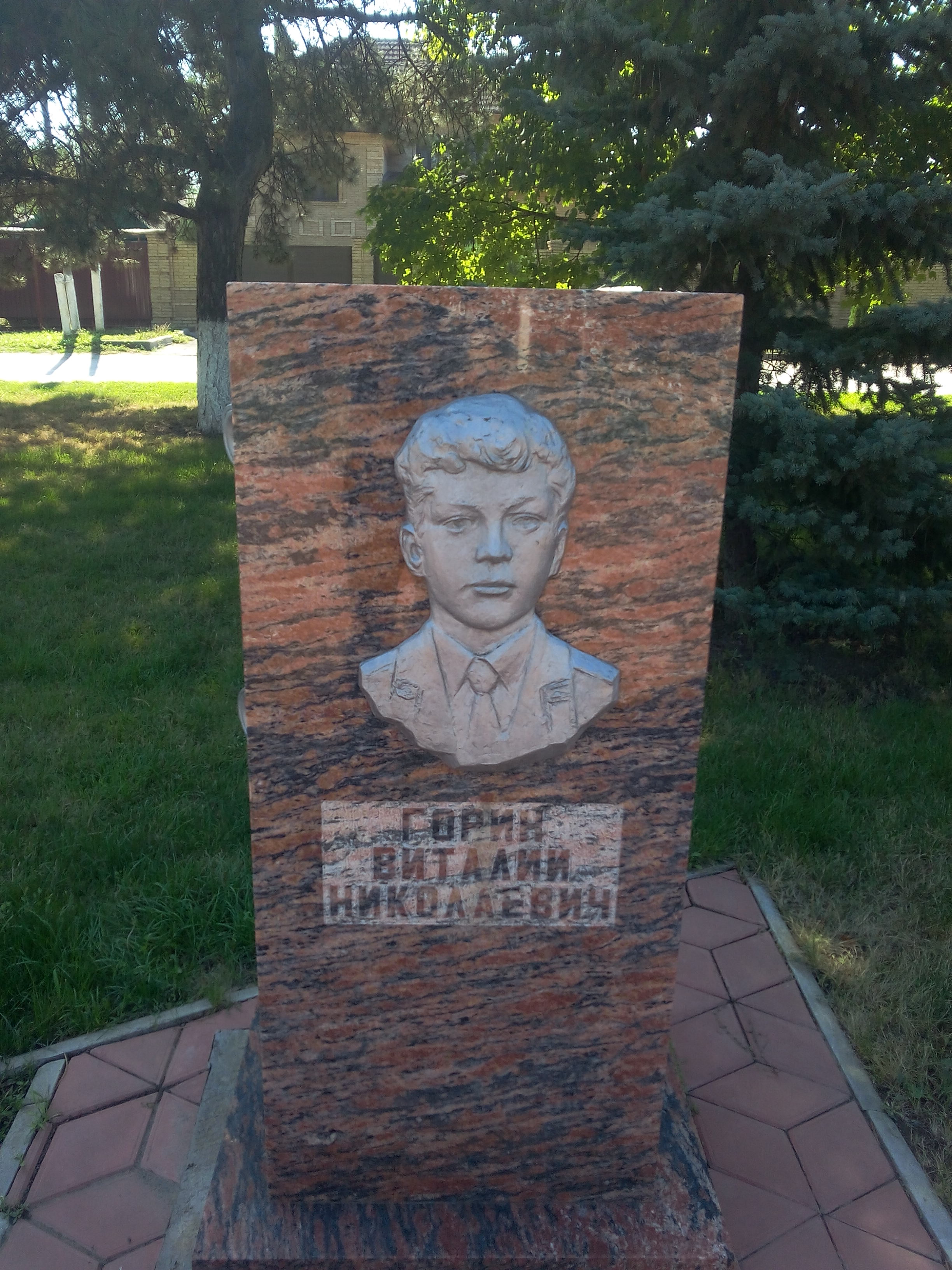 г. Сальск, пл. Свободы, памятная стела с барельефом Горина В.Н. на Аллее Героев